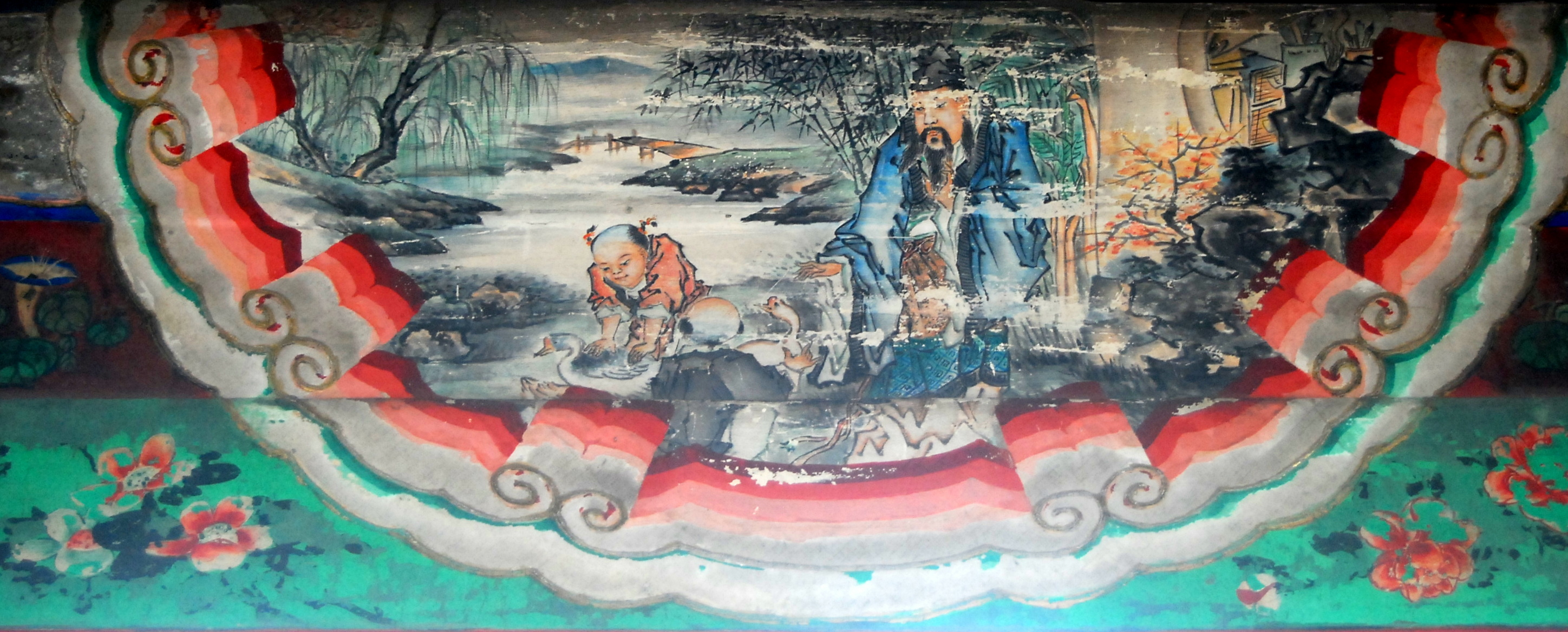 颐和园长廊上的彩绘：王羲之爱鹅